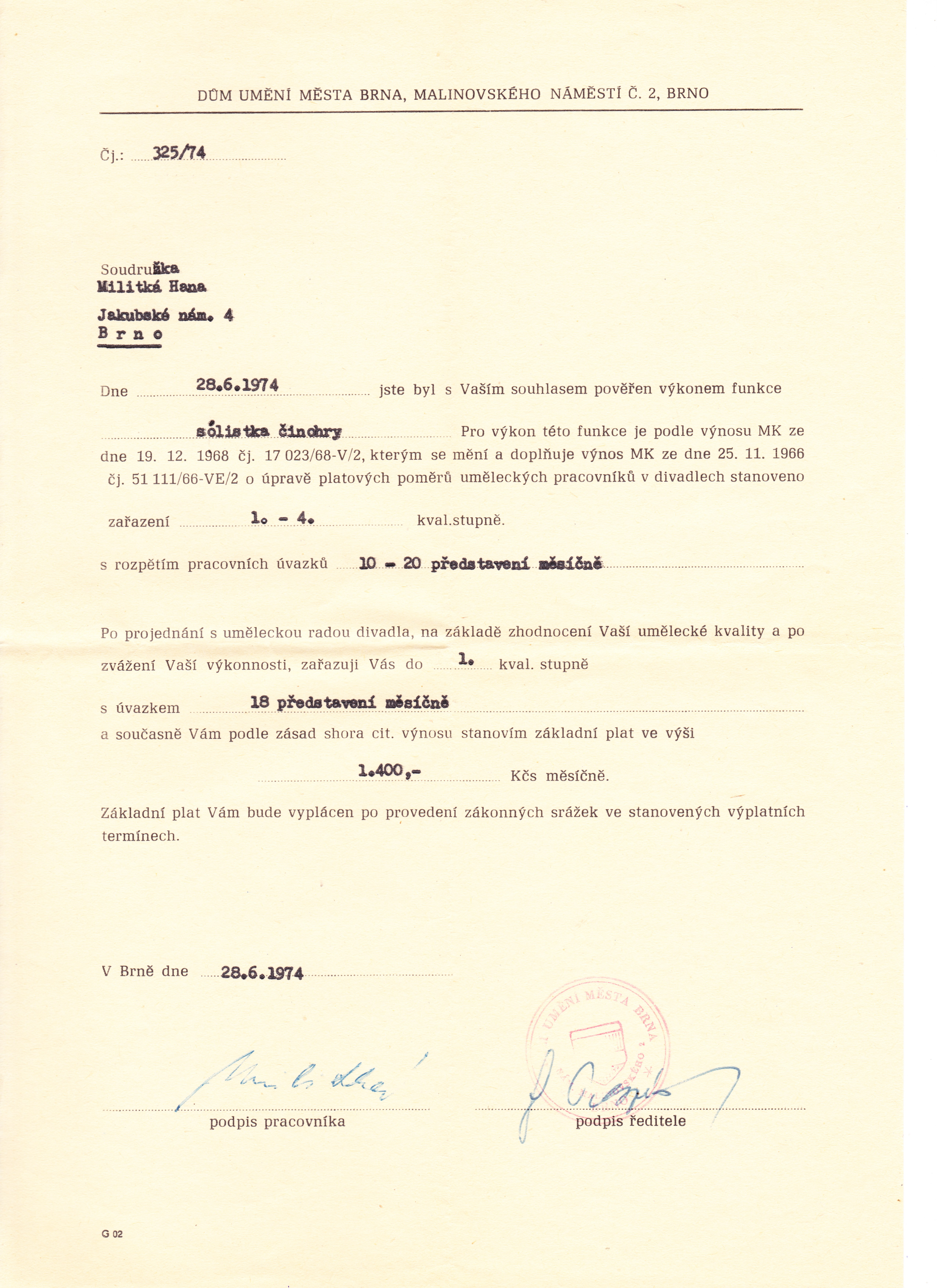 Pracovní smlouva s Divadlem na provázku 2.